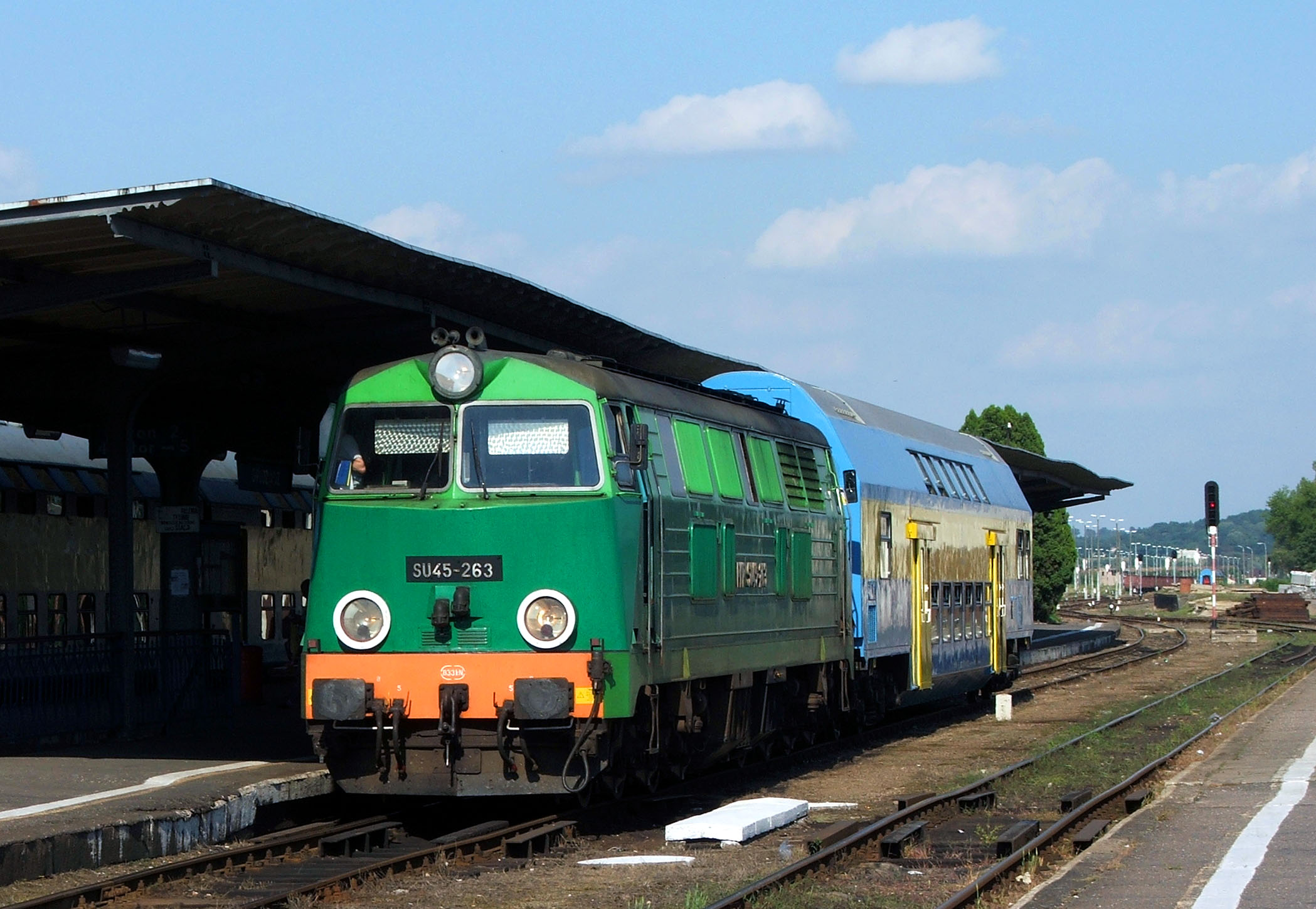 SU45-263 z poc. os. Grudziądz - Toruń Gł. Stacja Grudziądz.